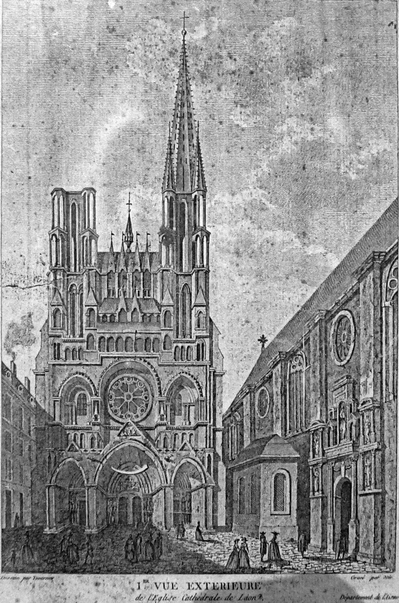 gravure de la Cathédrale Notre-Dame de Laon.